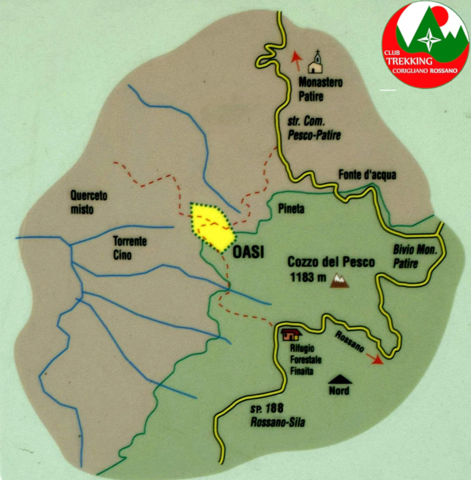 punti di riferimento